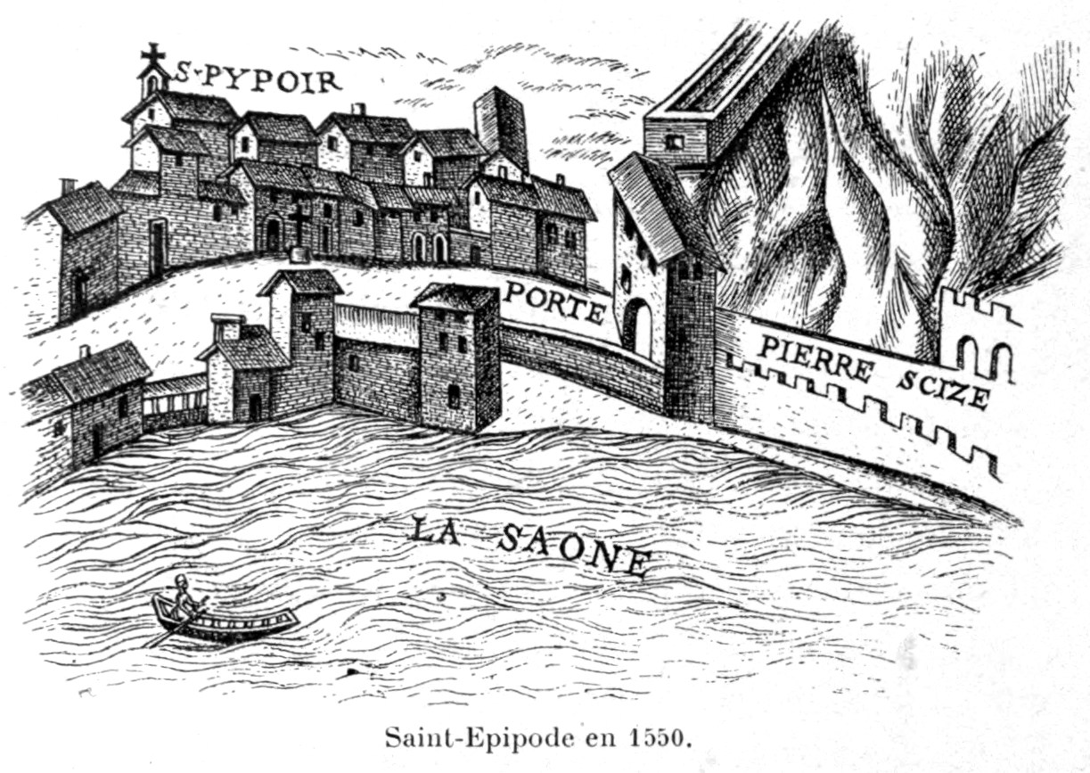 Illustration puor l'Histoire des églises et chapelles de Lyon